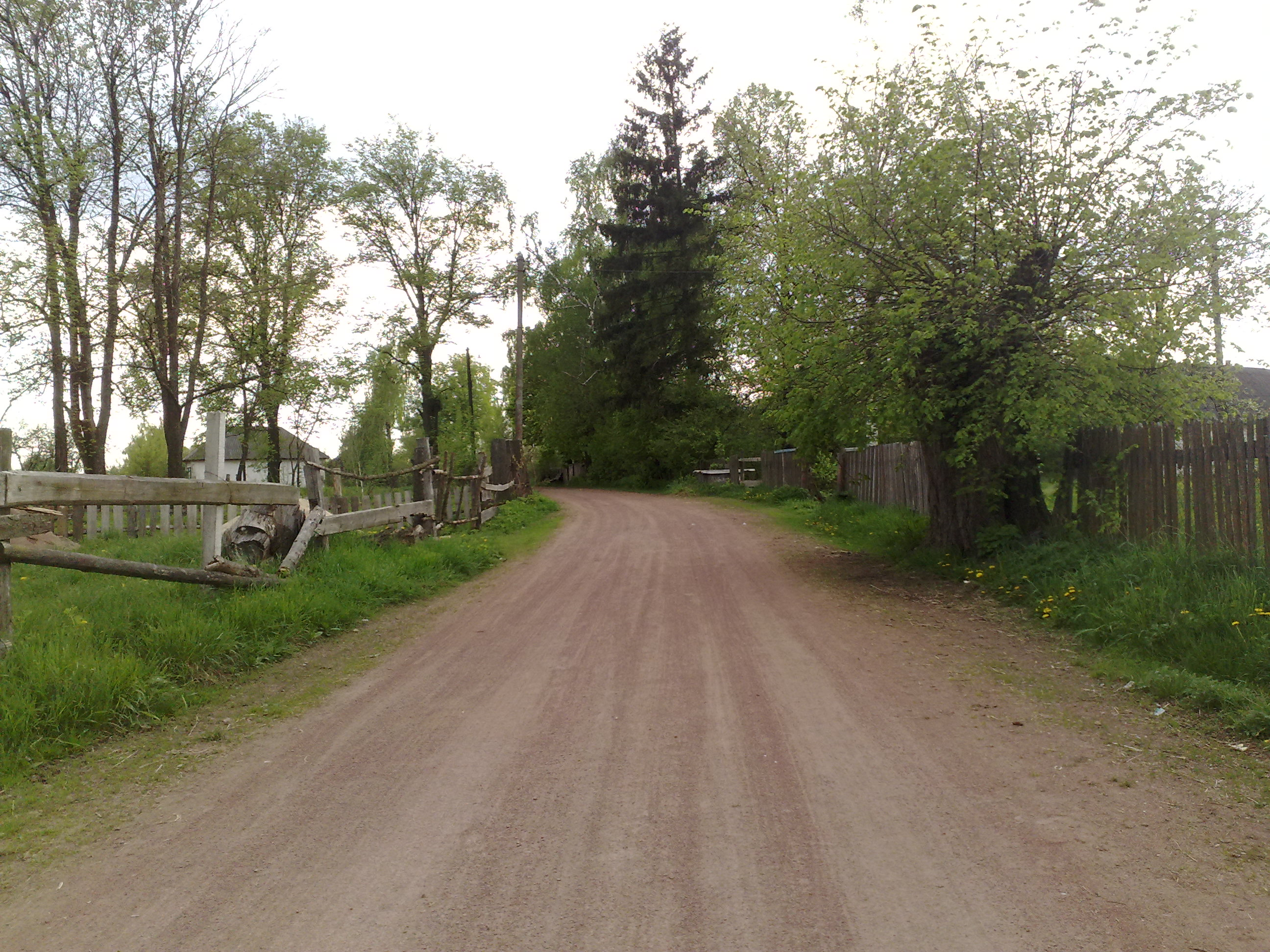 Дорога до місцевої кринички